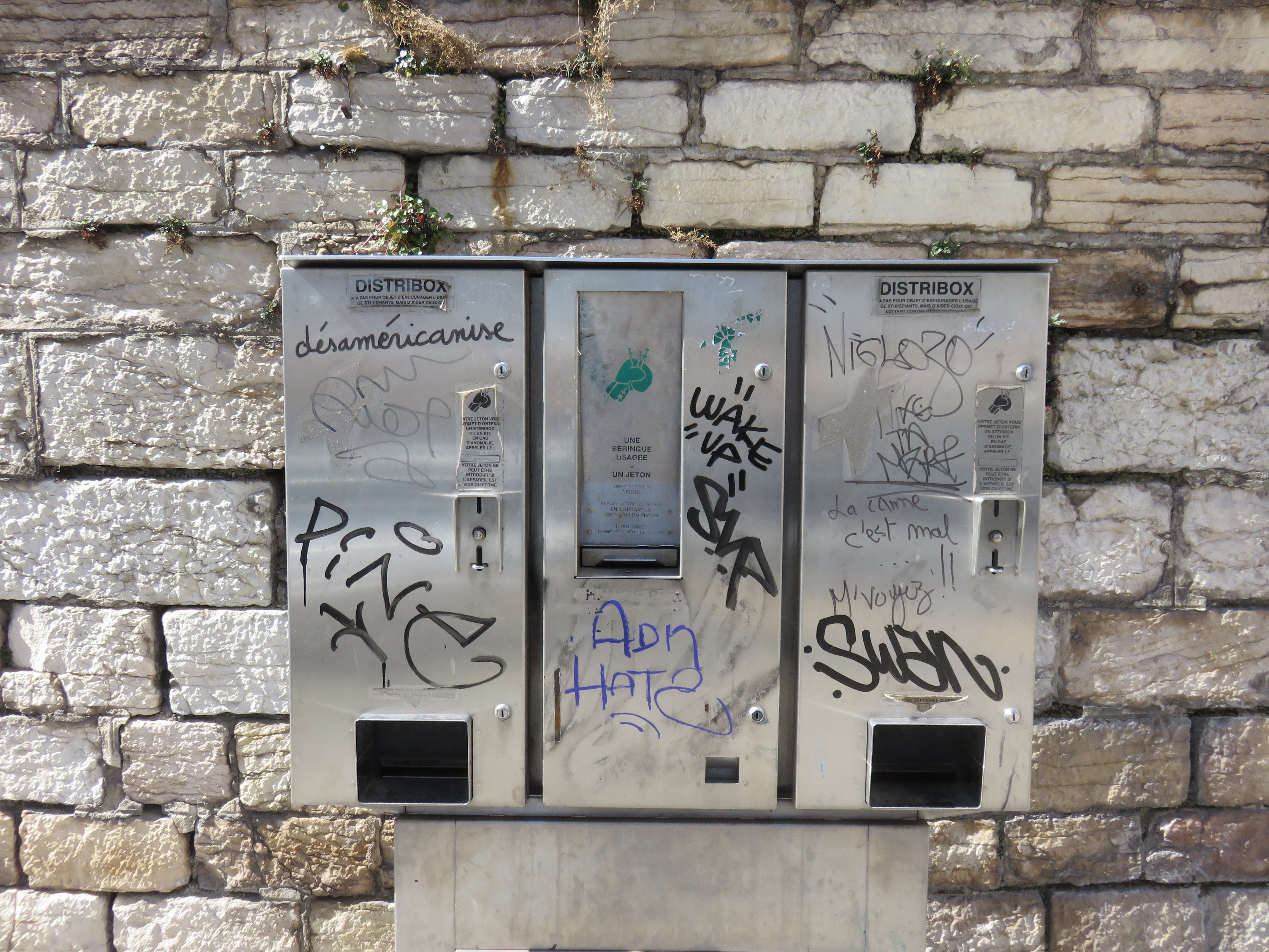 Un distributeur de seringues stérilisées pour les toxicomanes, appelée Distribox, cours Verdun Perrache, dans le 2e arrondissement de Lyon.